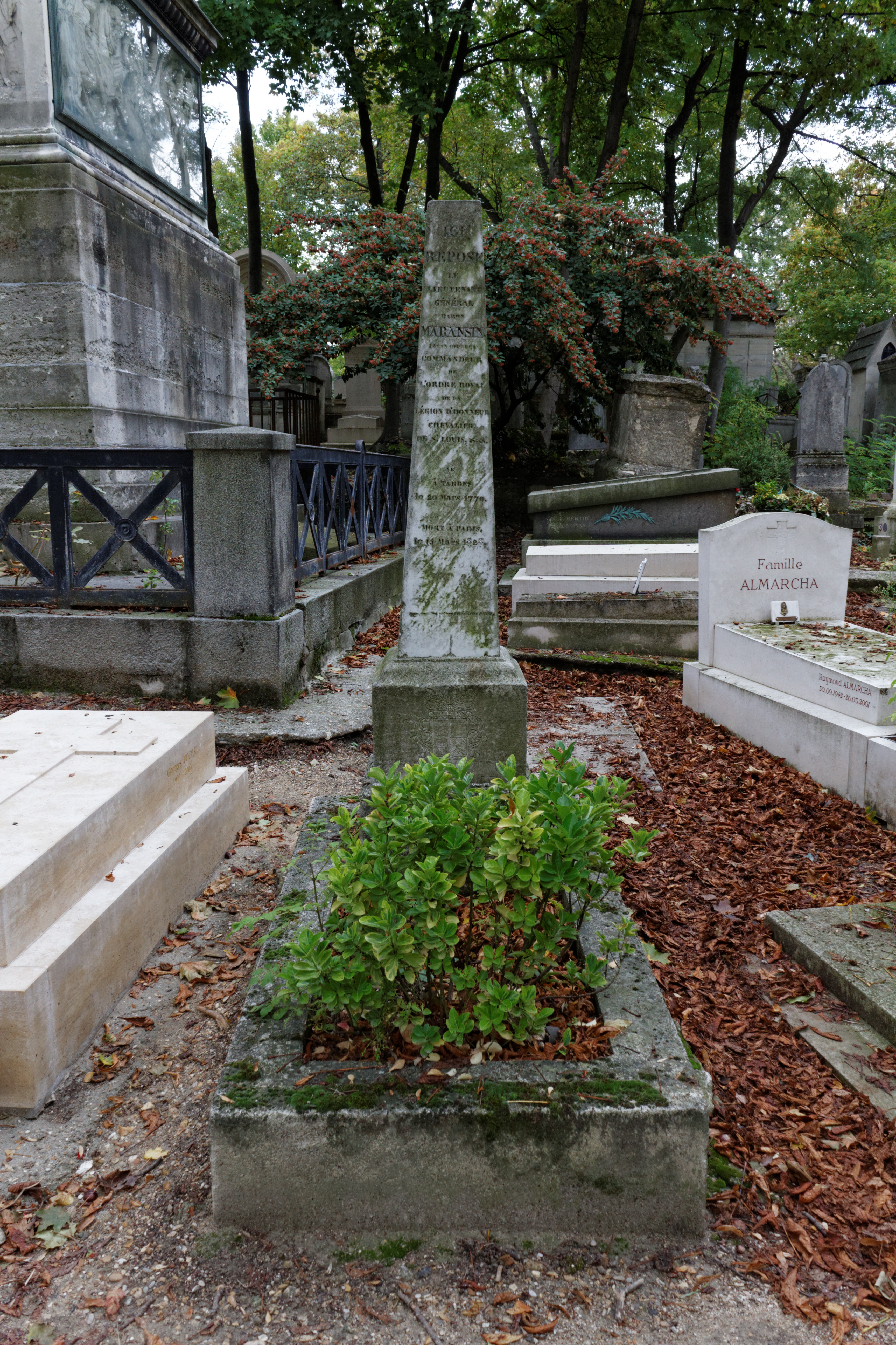 Vue d'ensemble